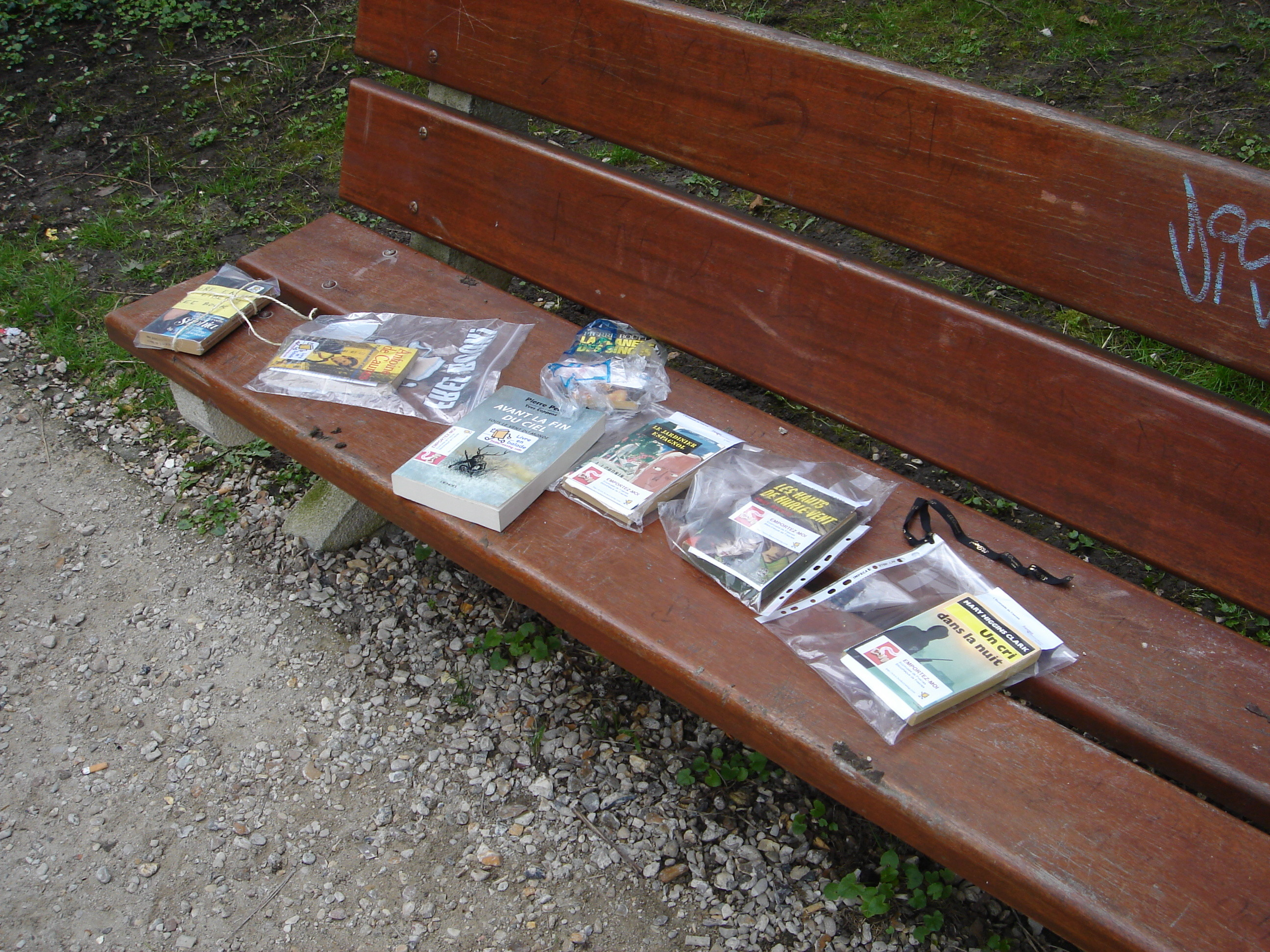 Les livres cueuillis puis reposés par le groupe d'enfants de tout à l'heure.